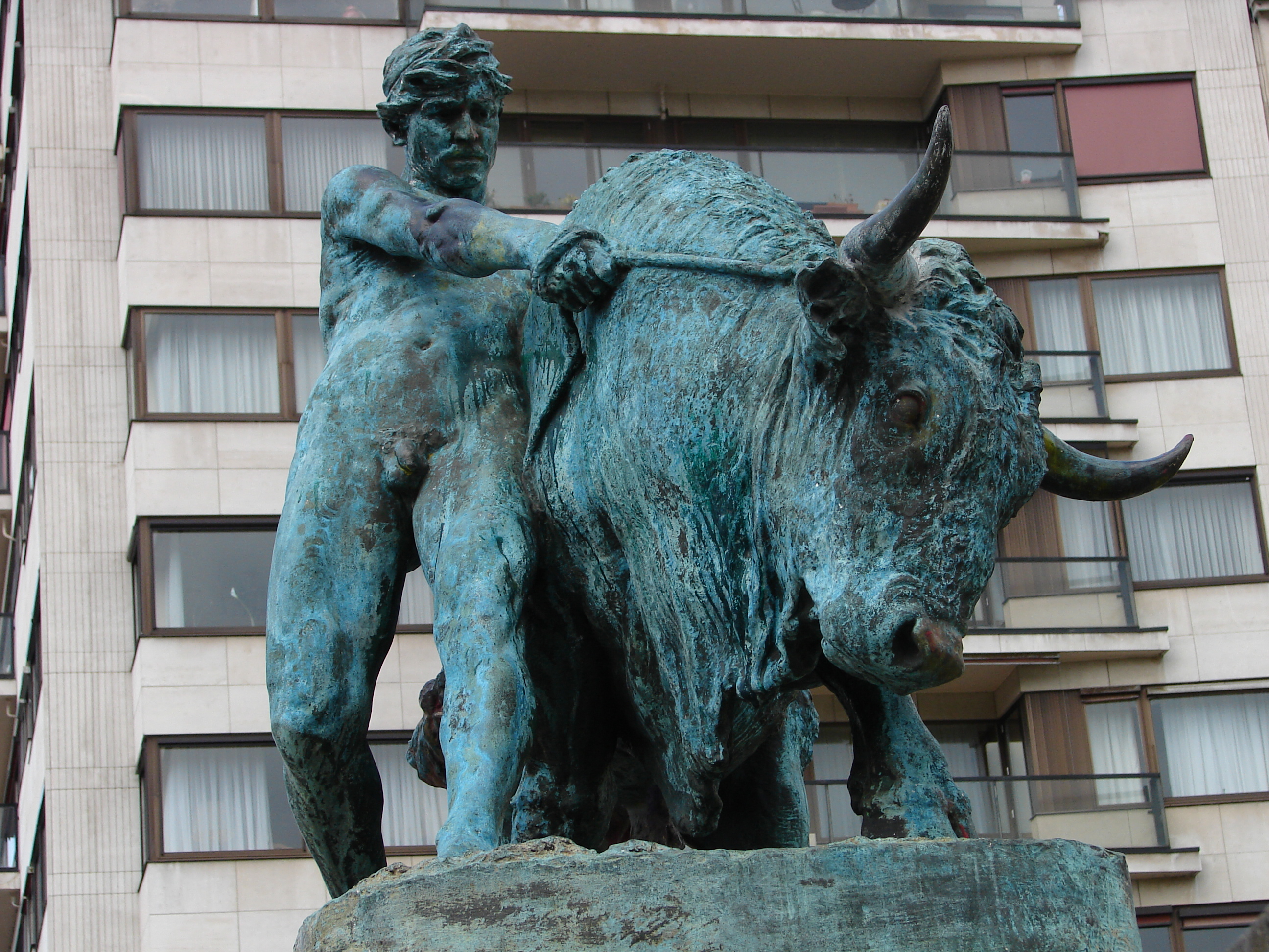 Le taureau de Liège par Léon Mignon, photographié par mes soins le 18 avril 2006.